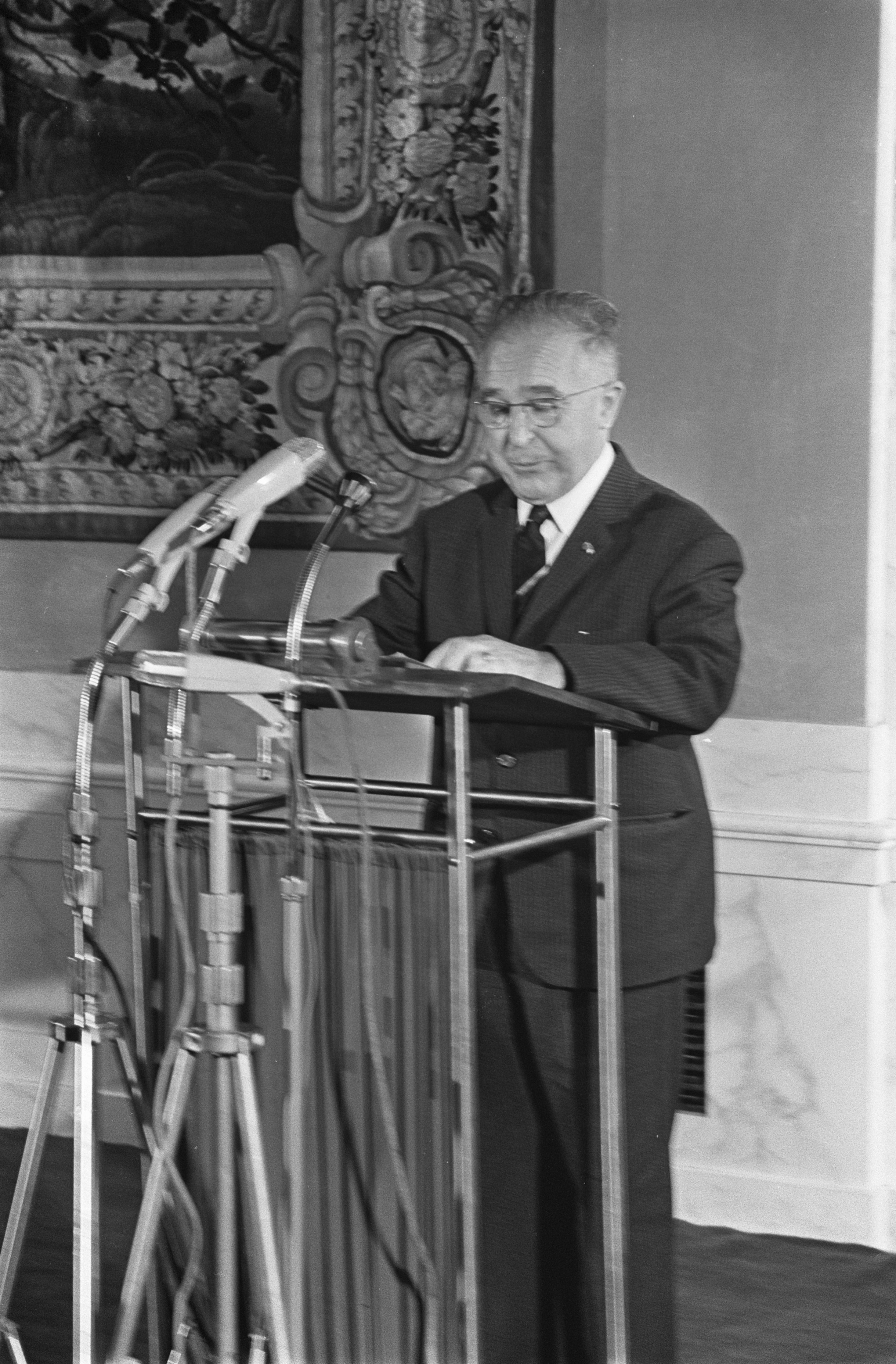 Collectie / Archief : Fotocollectie Anefo Reportage / Serie : Prijs der Nederlandse Letteren voor de Belgische schrijver Gerard Walschap Beschrijving : Gerard Walschap tijdens zijn dankwoord Datum : 4 oktober 1968 Locatie : Amsterdam, Noord-Holland Trefwoorden : prijsuitreikingen, schrijvers, toespraken Persoonsnaam : Walschap, Gerard Fotograaf : Fotograaf Onbekend / Anefo Auteursrechthebbende : Nationaal Archief Materiaalsoort : Negatief (zwart/wit) Nummer archiefinventaris : bekijk toegang 2.24.01.05 Bestanddeelnummer : 921-7397